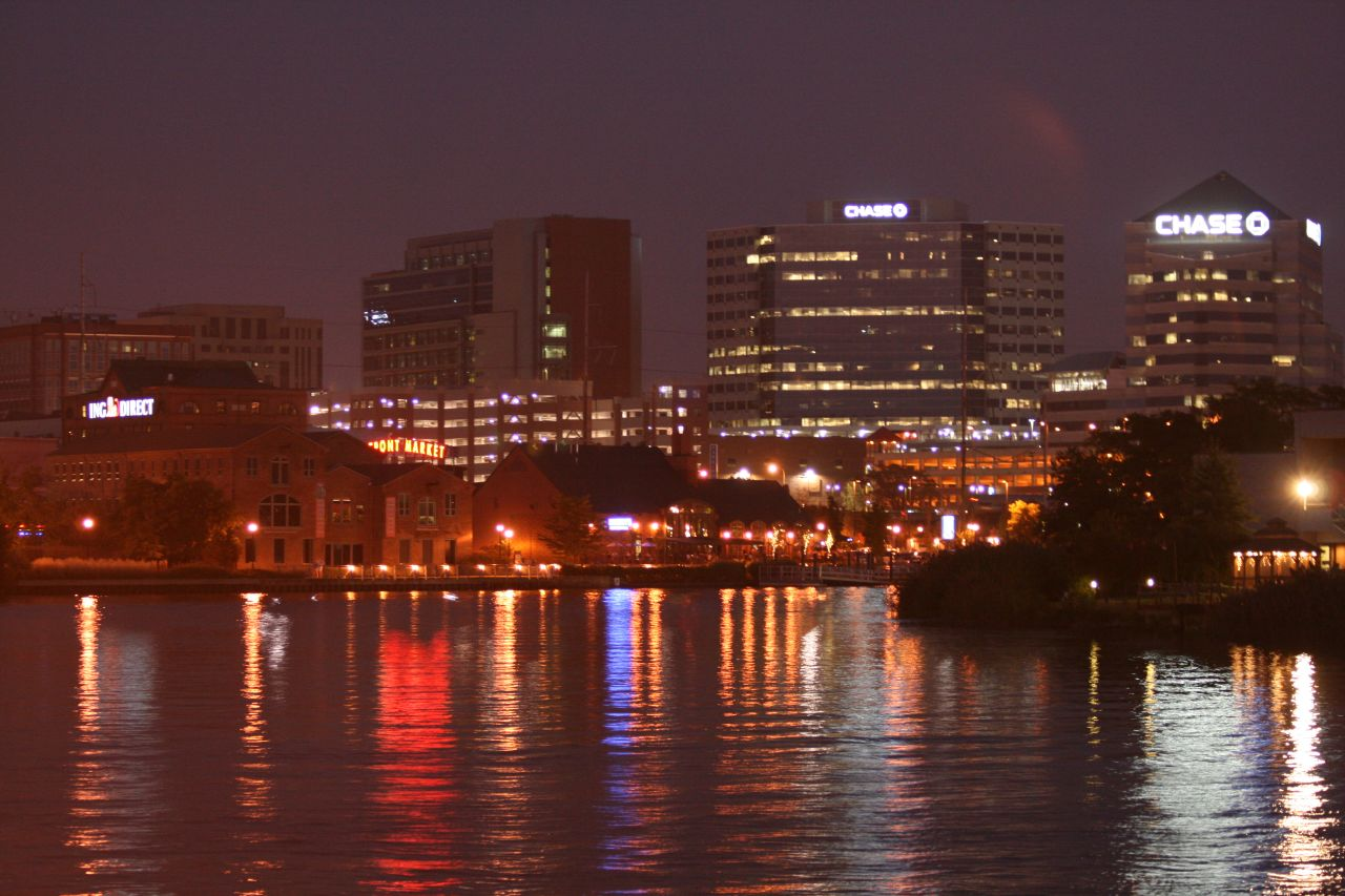 Wilmington evening skyline